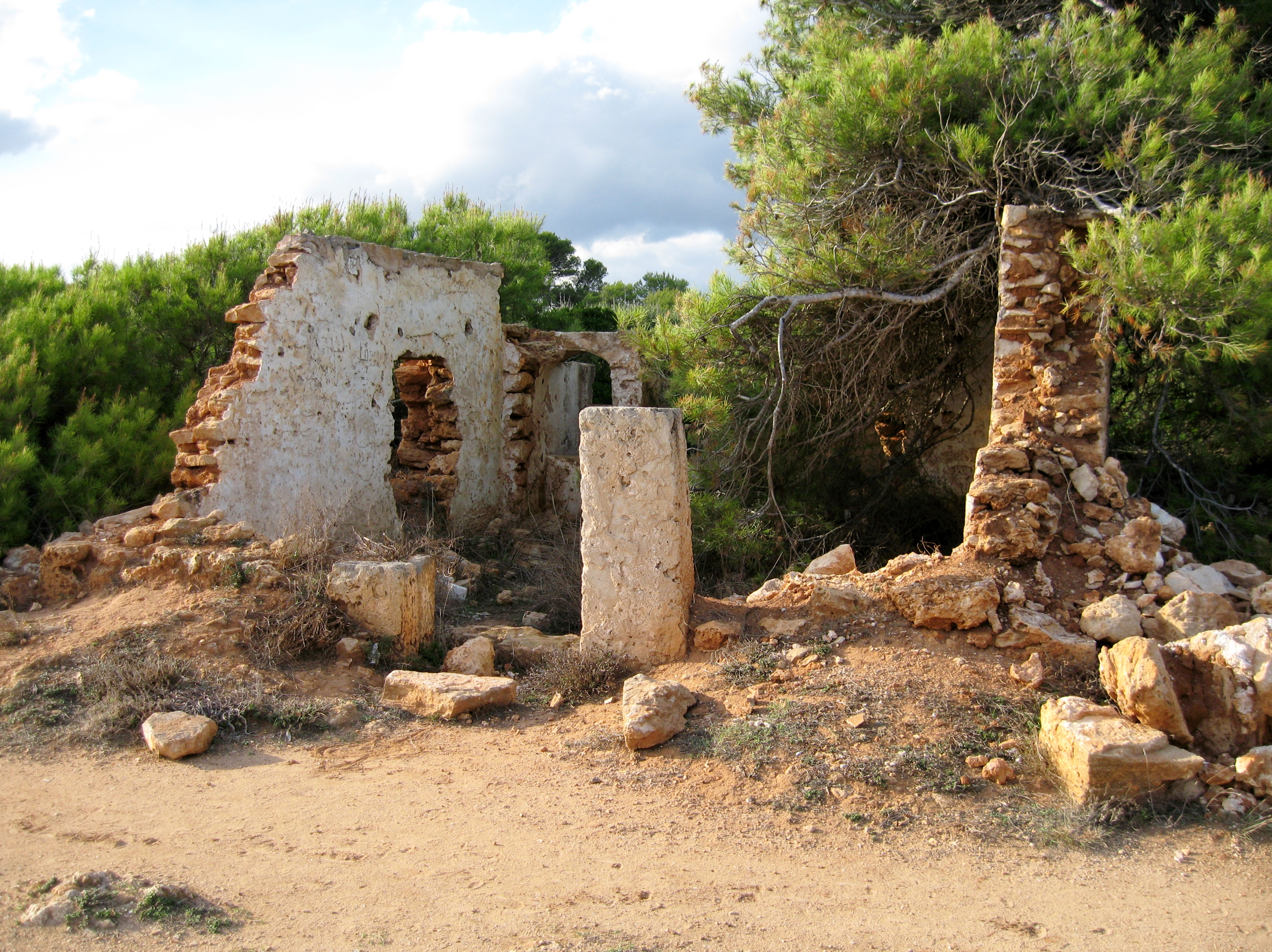 Sa Caseta des Moix, Punta de n'Amer, Sant Llorenç des Cardassar, Mallorca, Spain